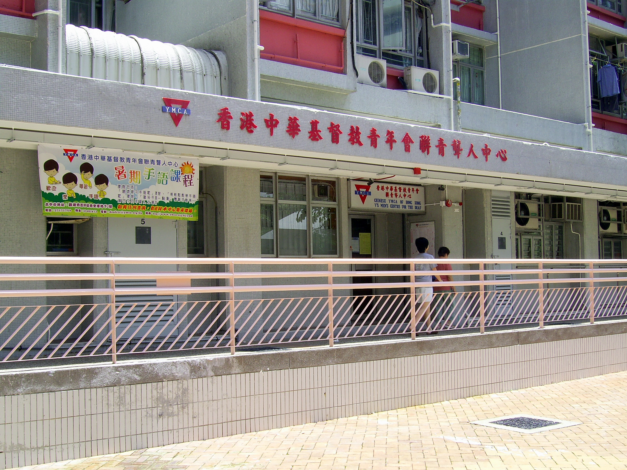 中文（香港）: 香港中華基督教青年會聯青聾人中心